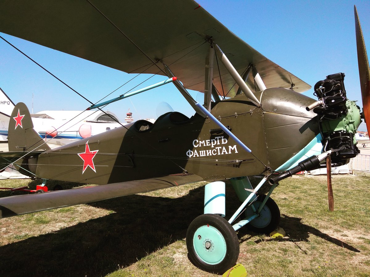 PolikarpovPo-2 del ejército soviético pilotado por el escuadrón de mujeres Nachthexen (Brujas de la Noche) durante la II Guerra Mundial. En el fuselaje puede leerse "Muerte a los fascistas". Este avión pertenece a la colección del Museo del Aire (Cuatro Vientos, Madrid) de la Fundación Infante de Orleans.